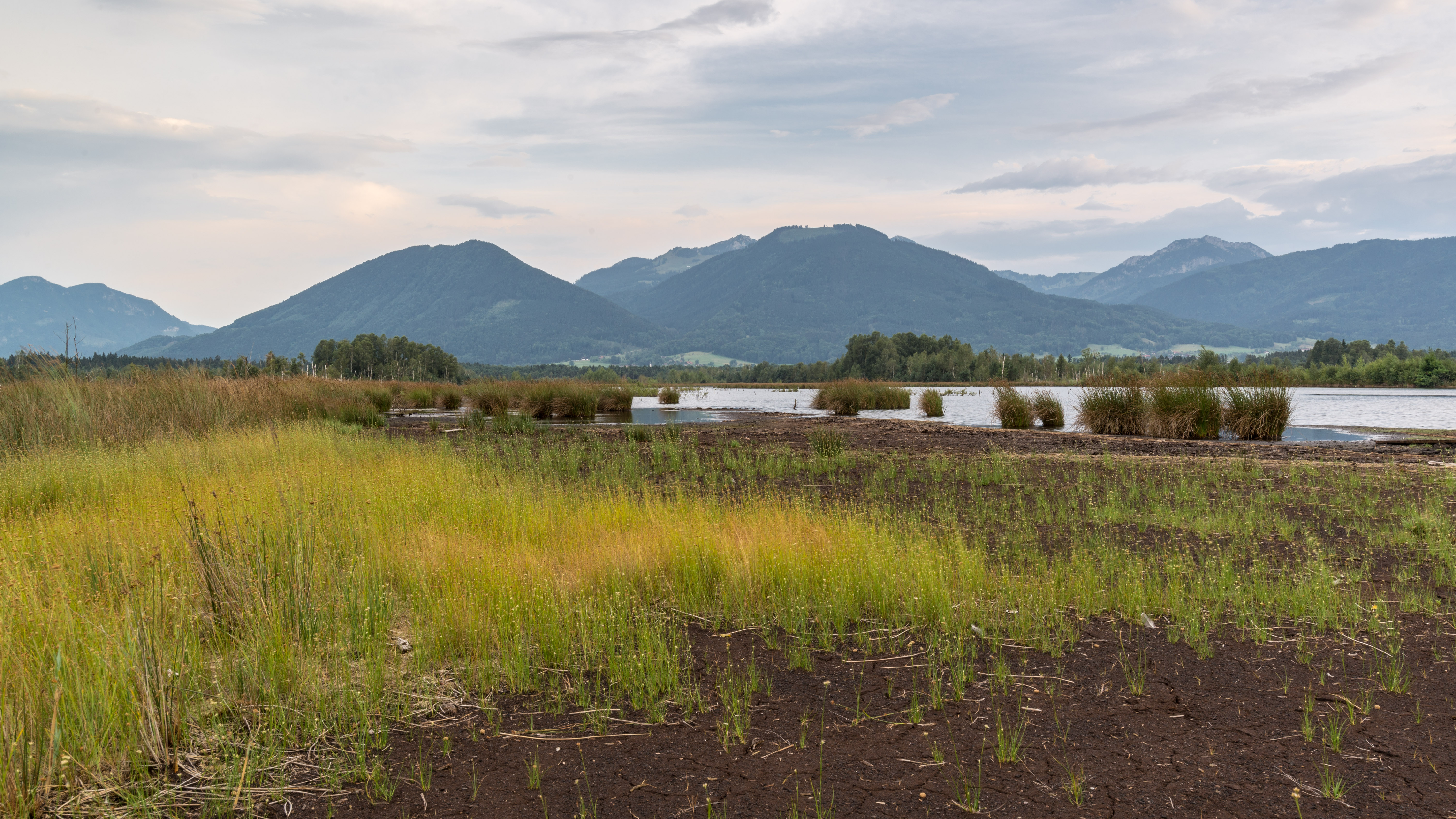 Die Hochrunstfilze gegen Sulzberg, Farrenpoint und Breitenstein. "LSG Hochrunstfilze" (LSG-00448.01) im Landkreis Rosenheim.